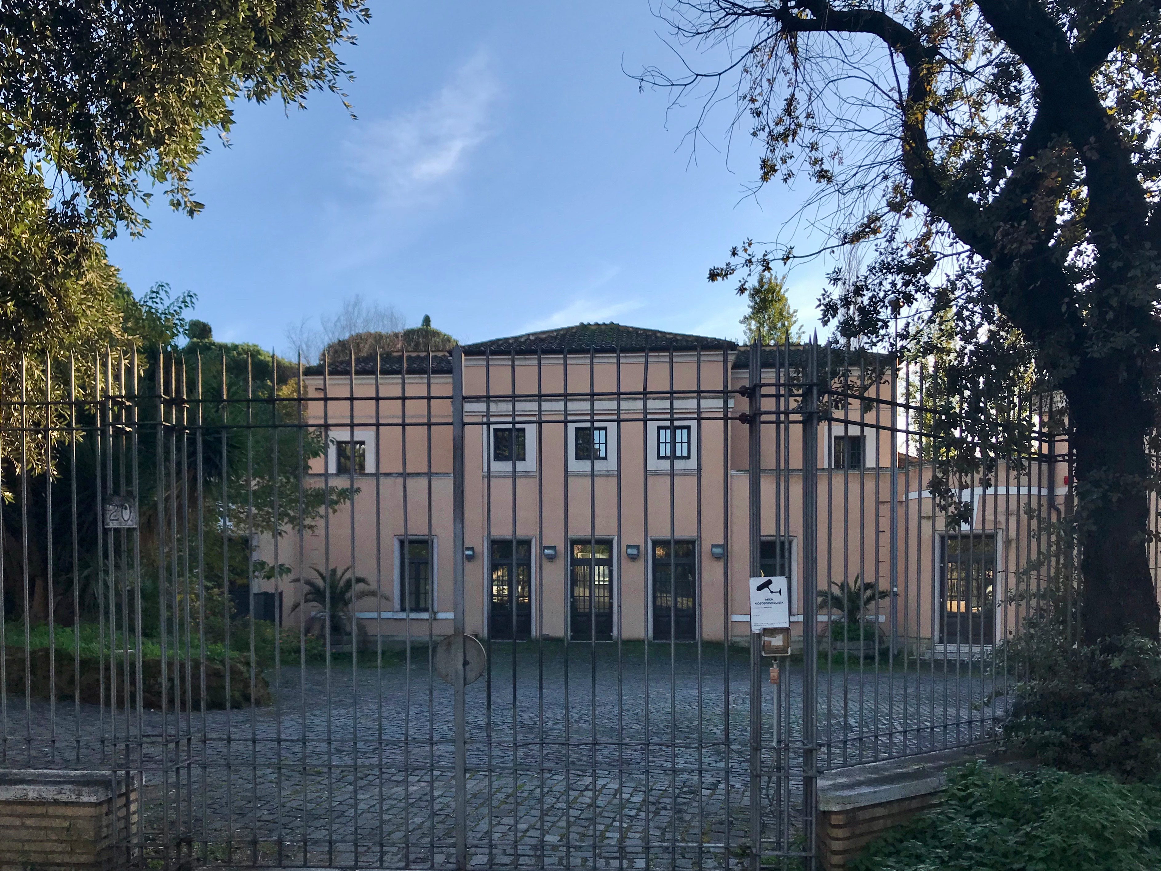 Ex Palestra dei Vigili Urbani in Rome